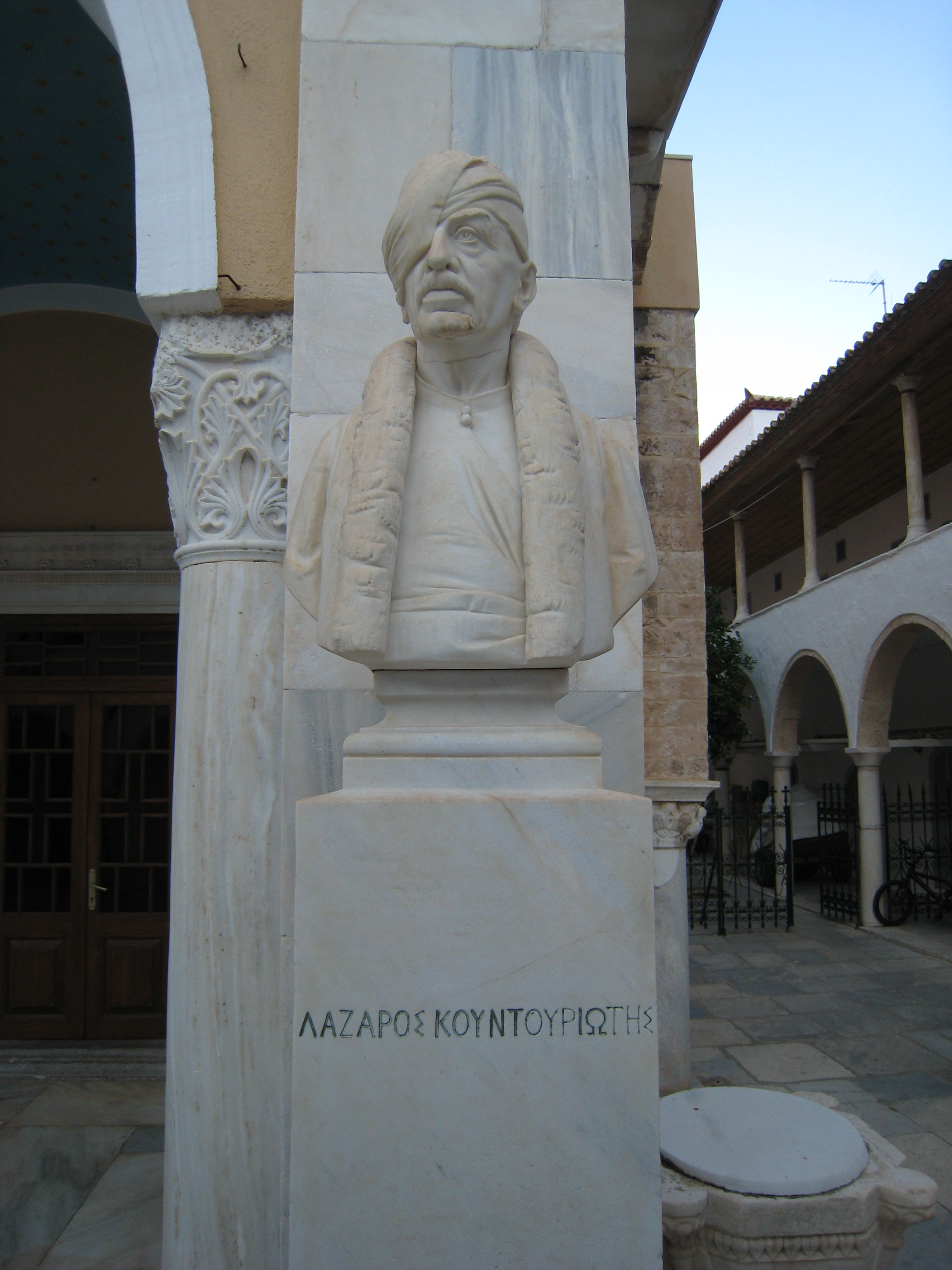 Statue de Lazaros Koundouriotis à Hydra, devant l'église.